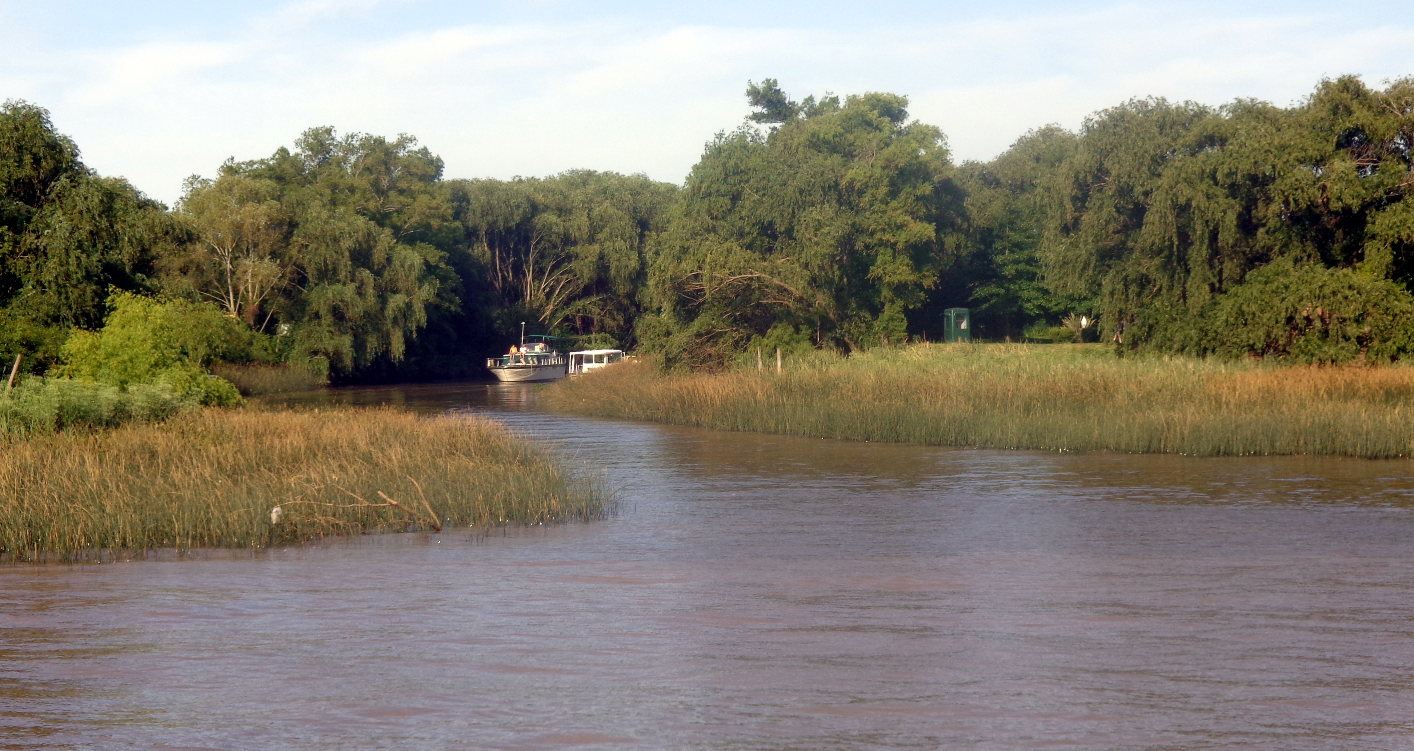 Acceso a San Fernando desde el Río de la Plata.